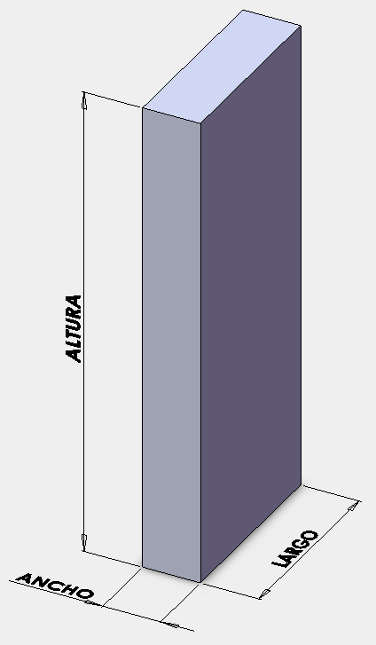 Paralelepipedo donde se muestran los nombres de sus medidas, Largo Ancho y Altura.